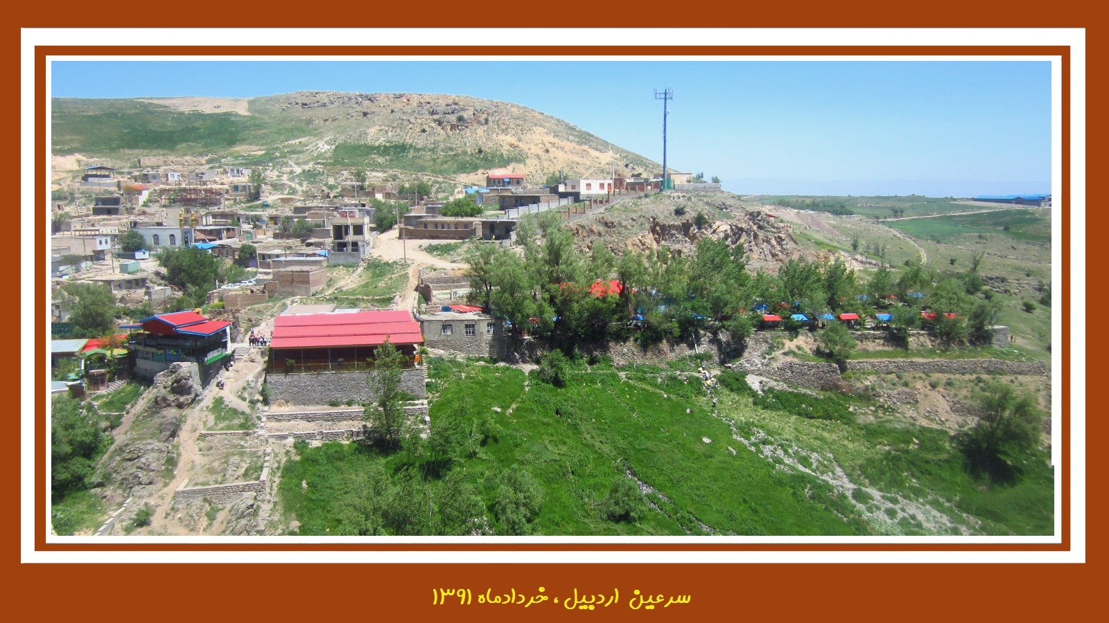 Sareyn Ardabil-سرعین اردبیل